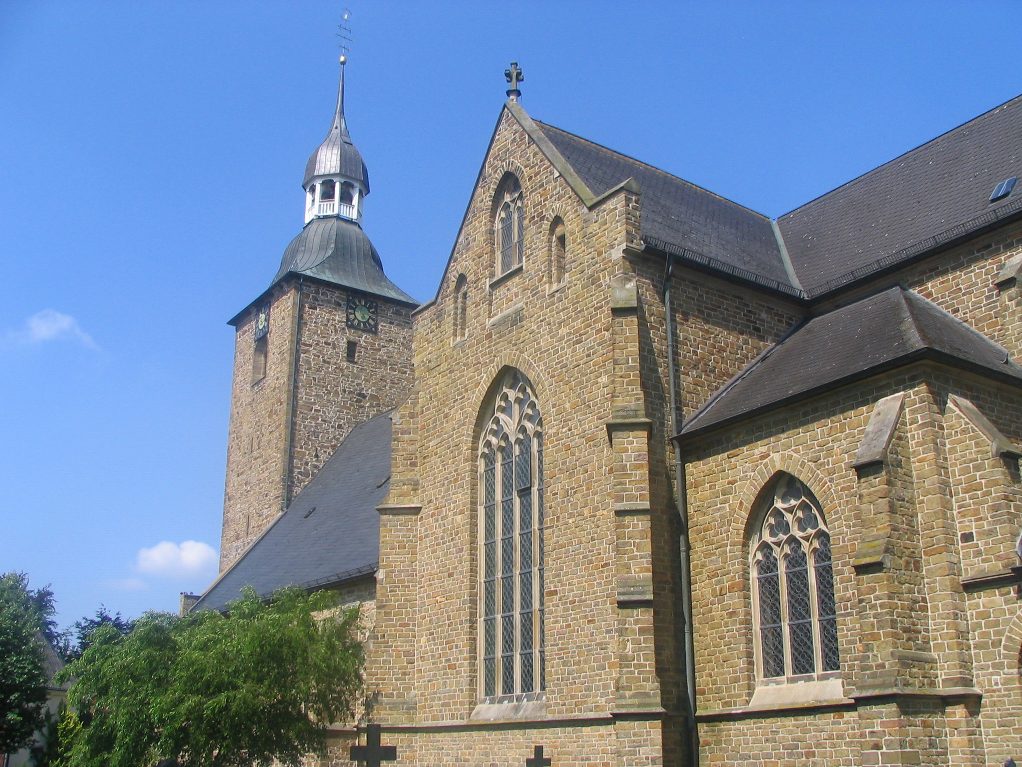 St. Johanniskirche in Alfhausen